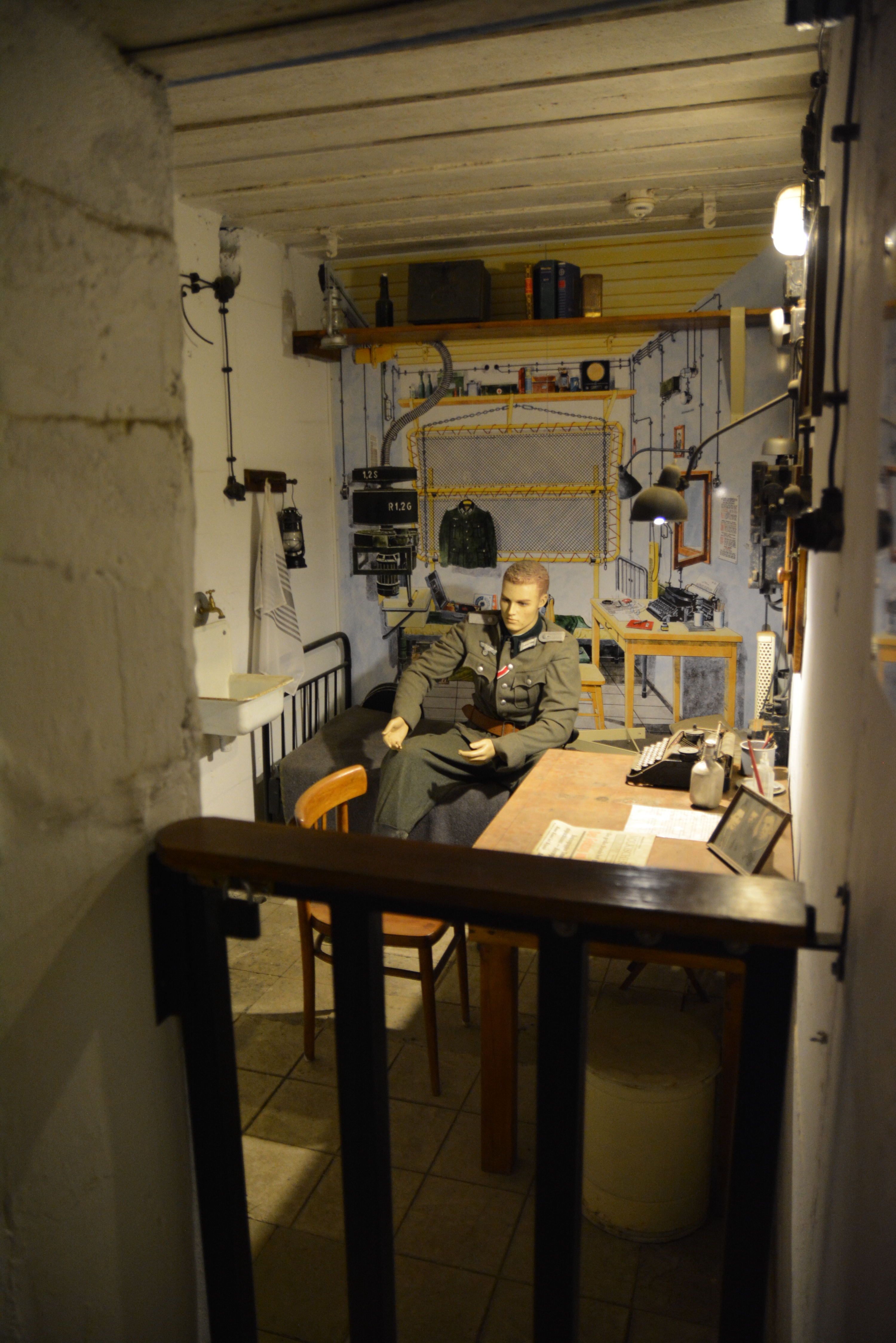 MRU - Muzeum Fortyfikacji i Nietoperzy w Pniewie